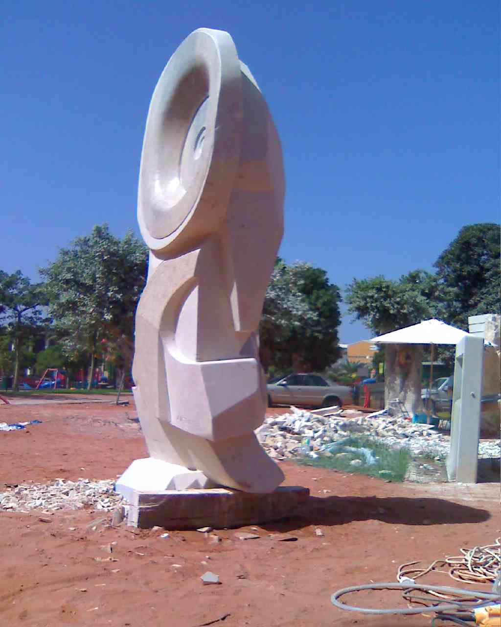 טובה